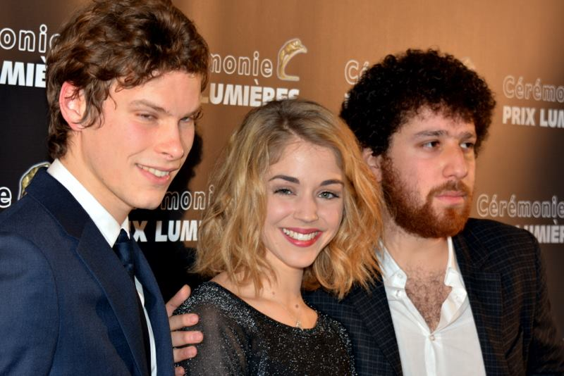 Jean-Baptiste Lafarge, Alice Isaaz et Thomas Blumenthal à la cérémonie des prix Lumières